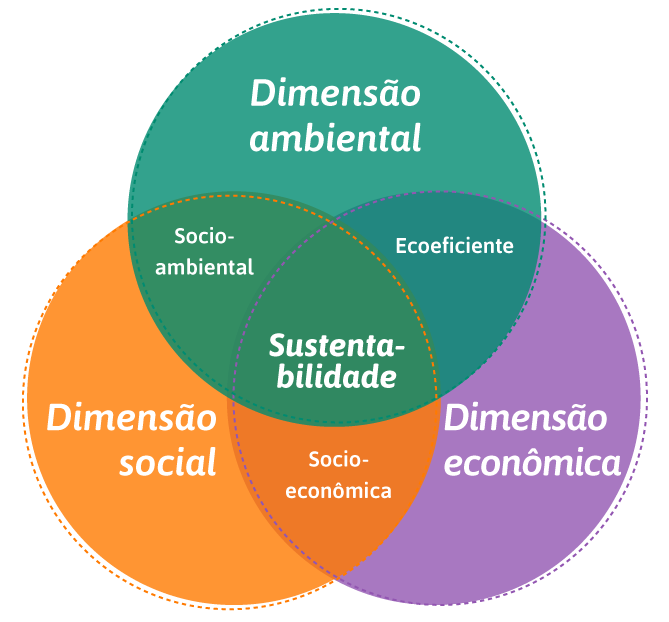 Sobreposição das três principais dimensões da sustentabilidade: ambiental, social e econômica. Adaptado do Manual de Boas Práticas para Eficiência Energética (2005, p. 6 apud Dickie, 2010)